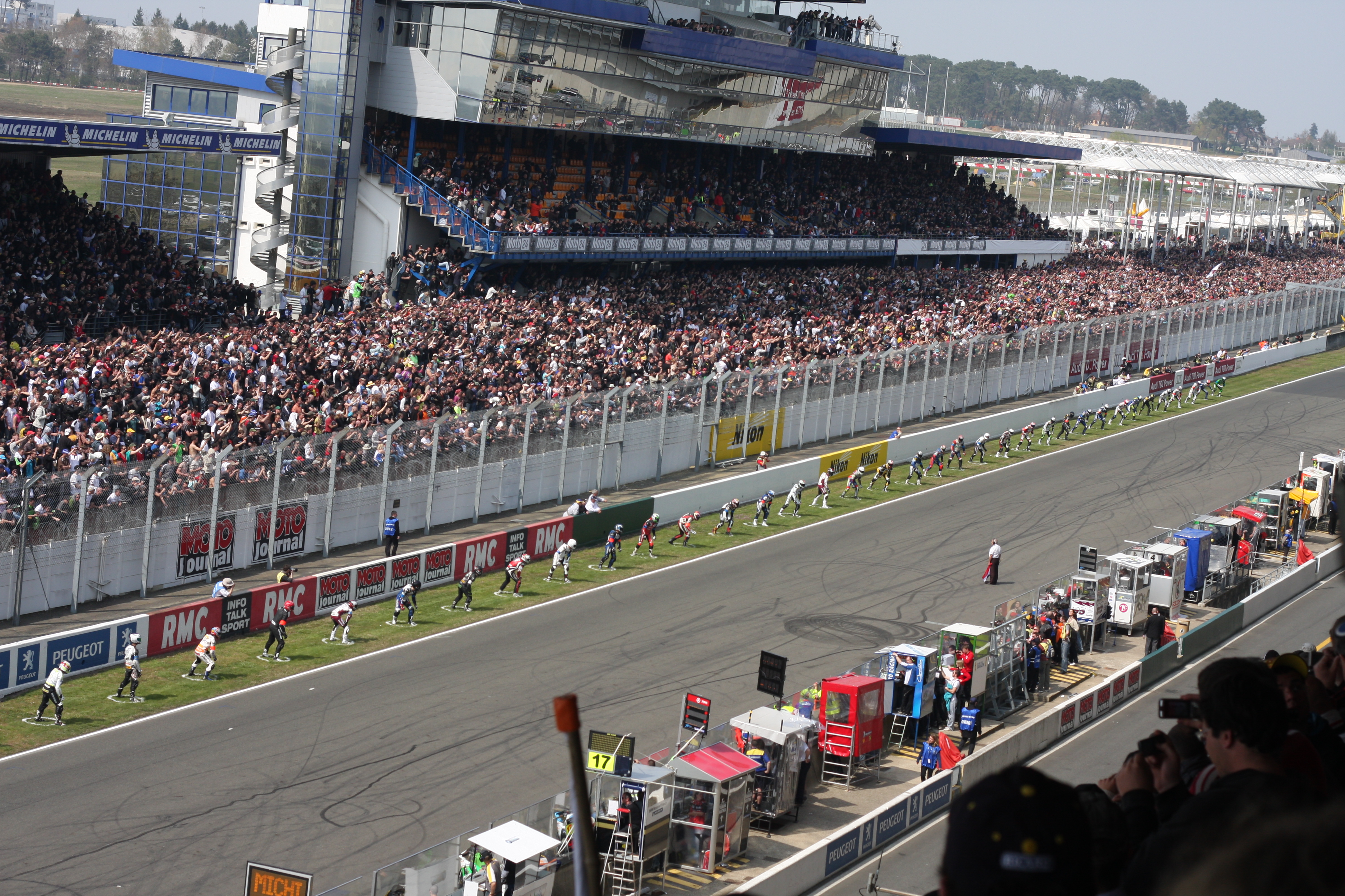 24 heures du mans moto 2010